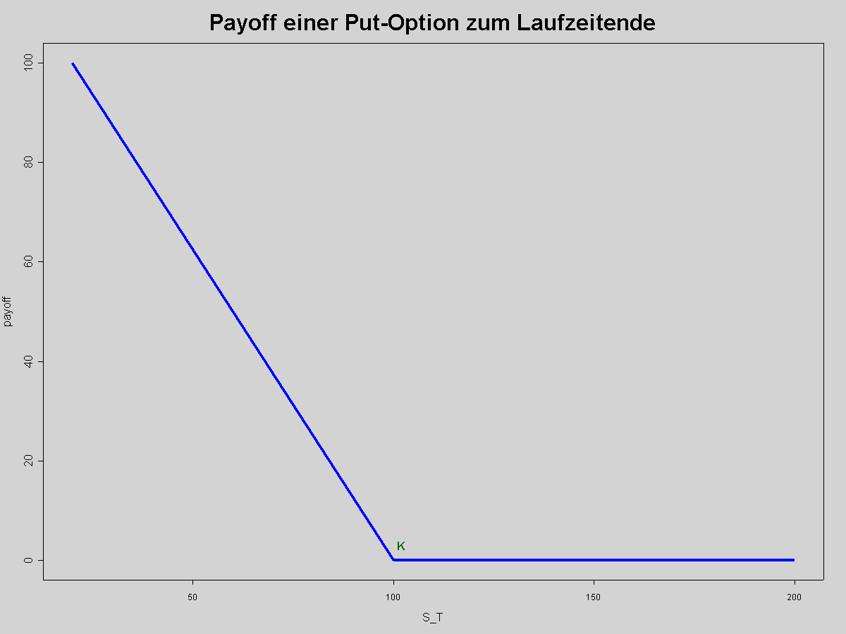 Payoff eines Puts zum Laufzeitende t=T; Graph der Funktion (K-S_T)+:=max(0,K-S_T) ; Hockeystick-Funktion